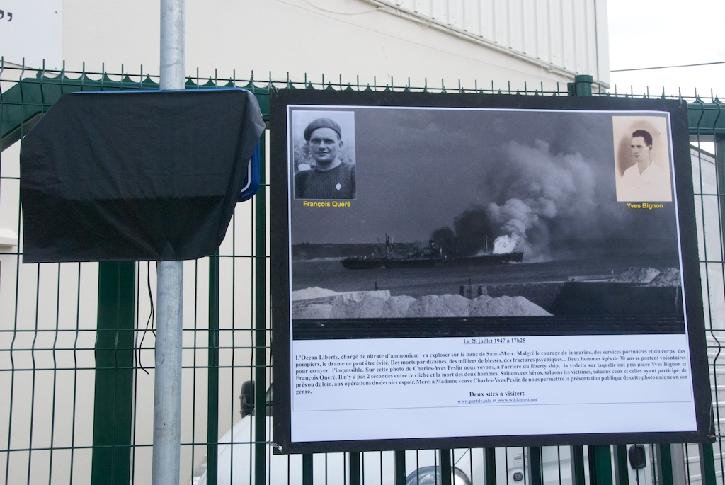 Tonnerres de Brest Espace François Quéré